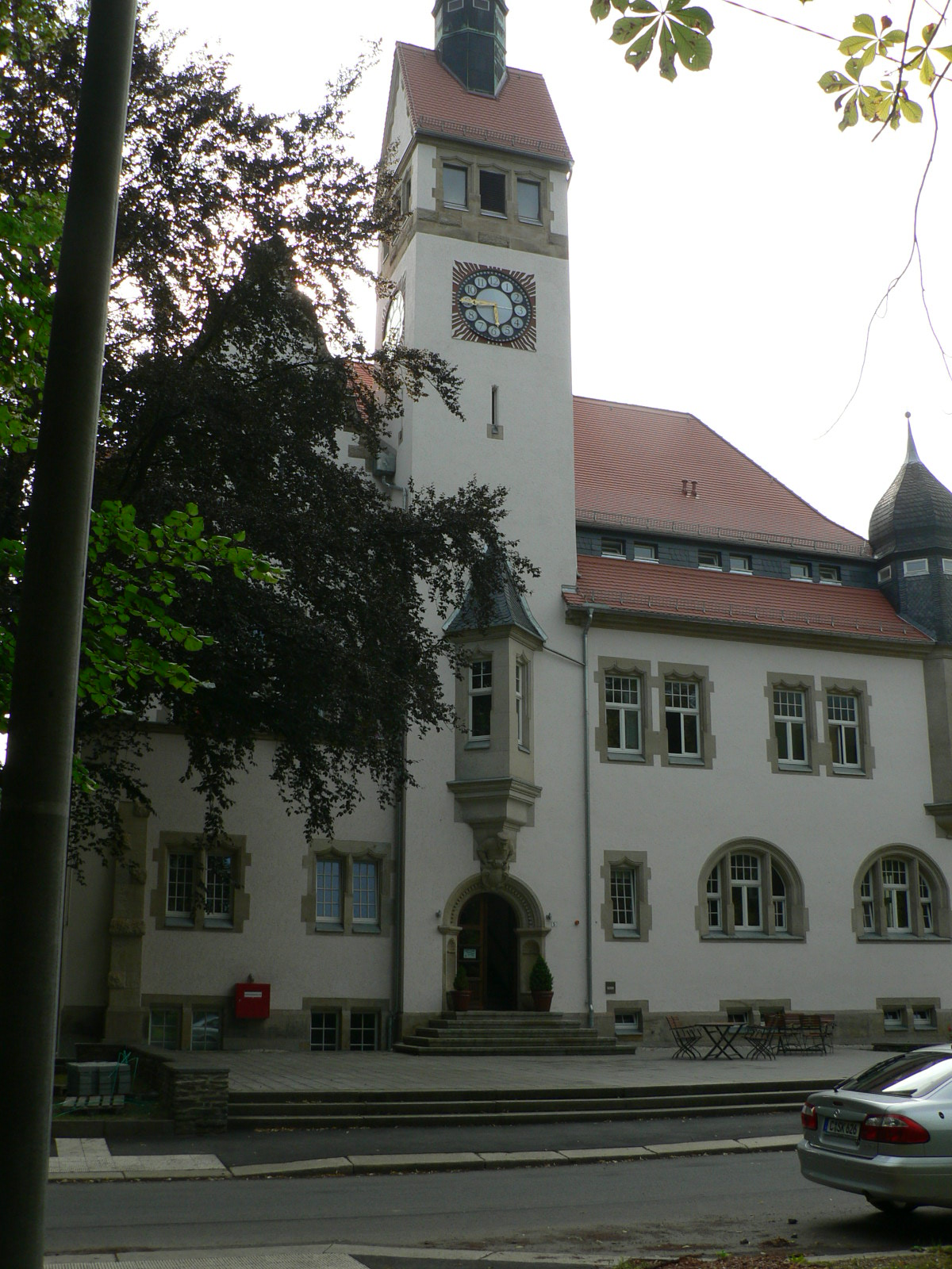 Rathaus des Chemnitzer Stadtteils Siegmar